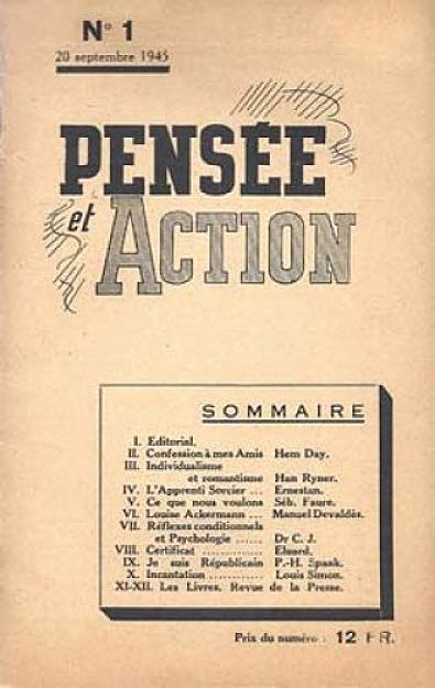 Pensée et Action est une revue anarchiste éditée en Belgique par Hem Day entre 1945 et 1952.